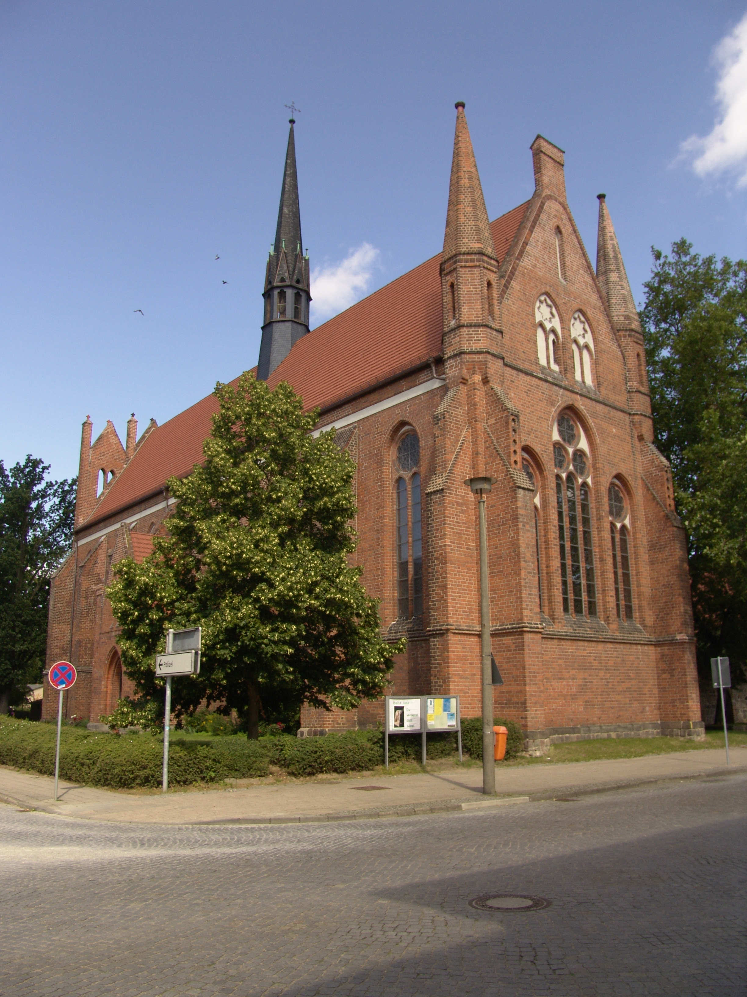 St. Johanneskirche in Neubrandenburg